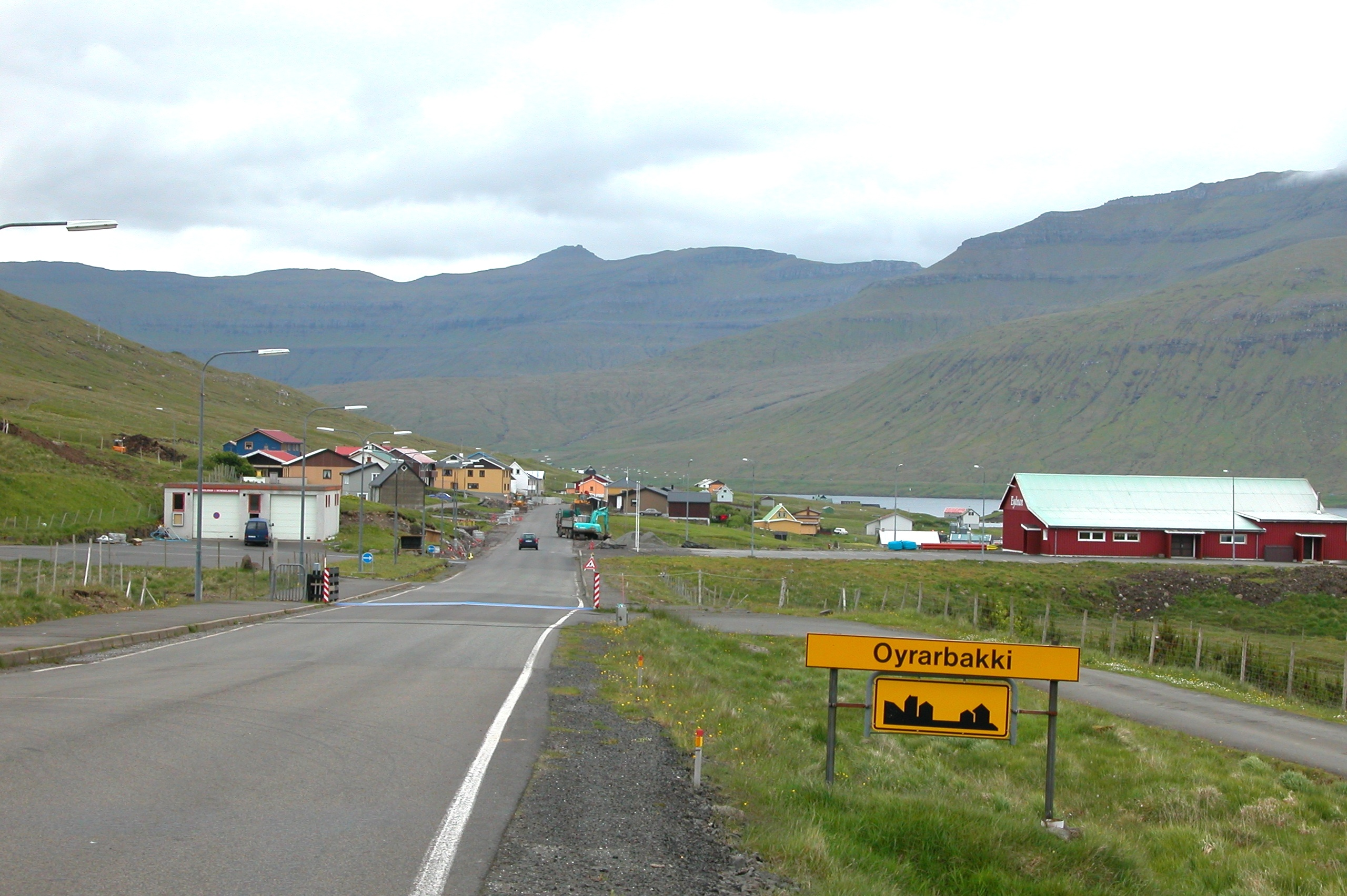 Oyrarbakki, Eysturoy, Faroe Islands.